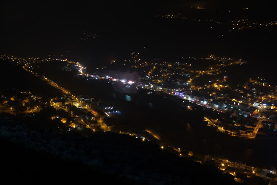 عکس سعید صادق پور از نمای رودبار در شب